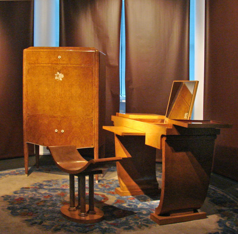 Salon de dame, 1925, en loupe d'Amboine Tapis en laine, 1951 Exposition "La maison Leleu, 50 ans de mobilier et de décoration" au Musée des Années 30 - Espace Landowski